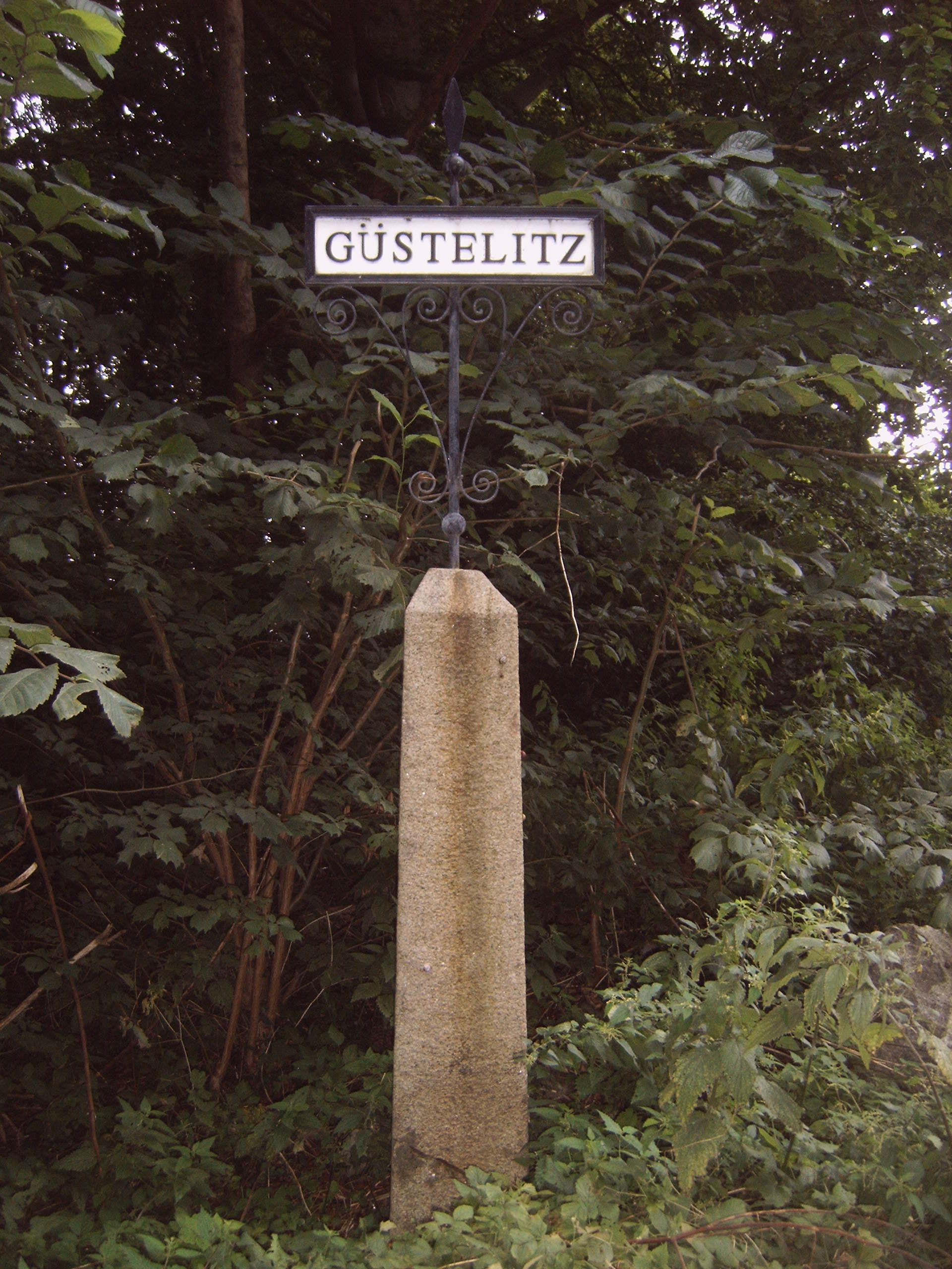 Wegweiser nach Güstelitz, Putbus, Rügen, Deutschland